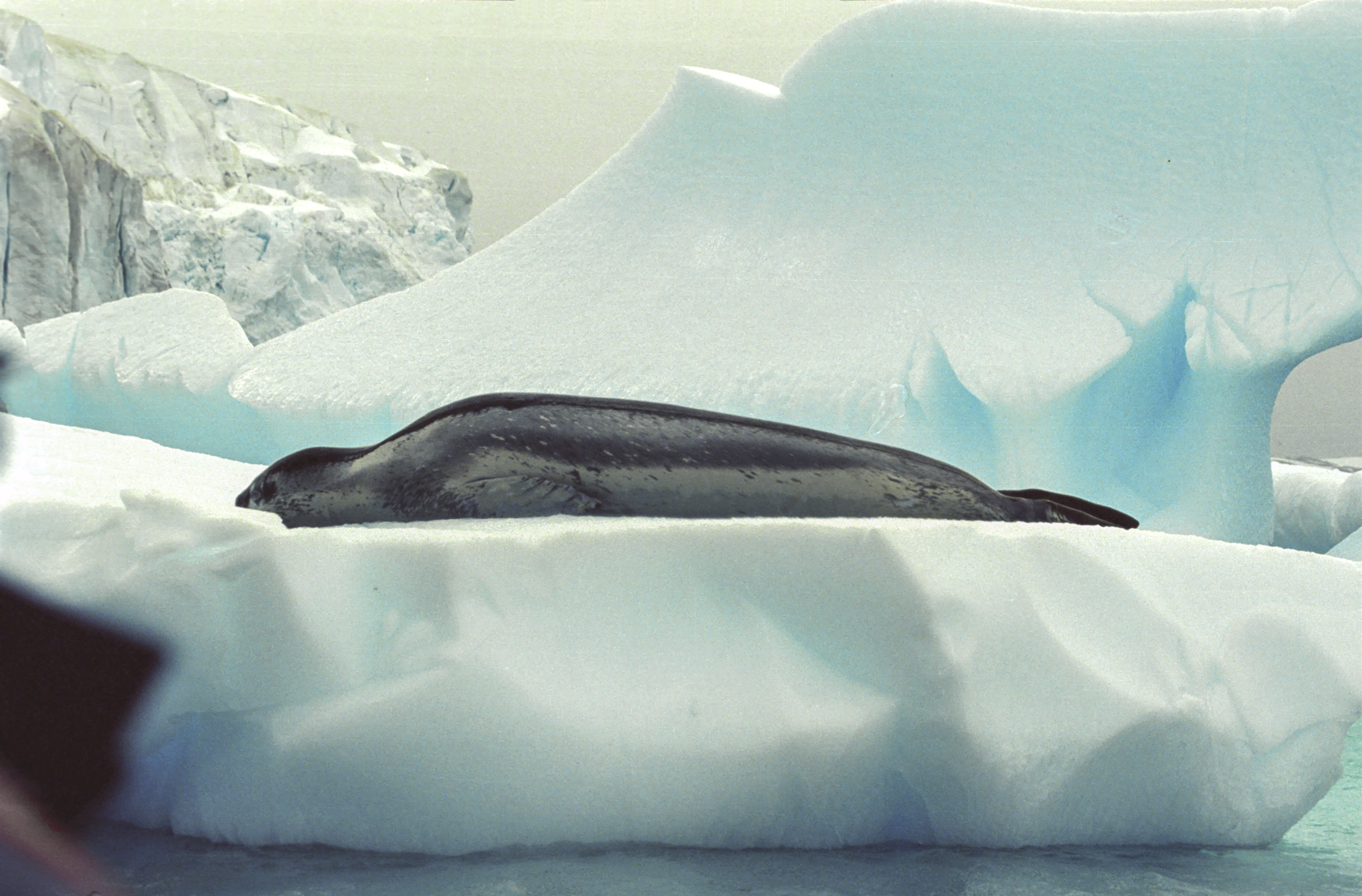 Antarctic